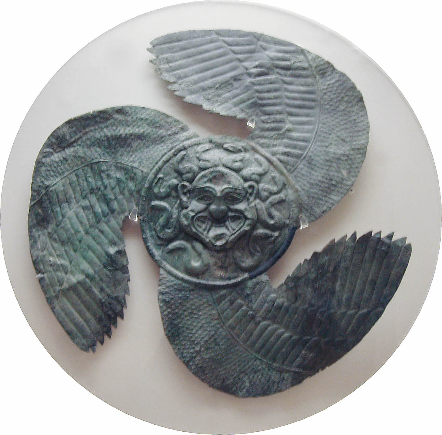 Gorgo und Flügel, wohl Schildverzierung, arch. Museum von Olympia